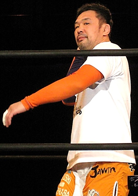 2015年3月22日 ベイコム総合体育館「Road to INVASION ATTACK 2015」桜庭和志